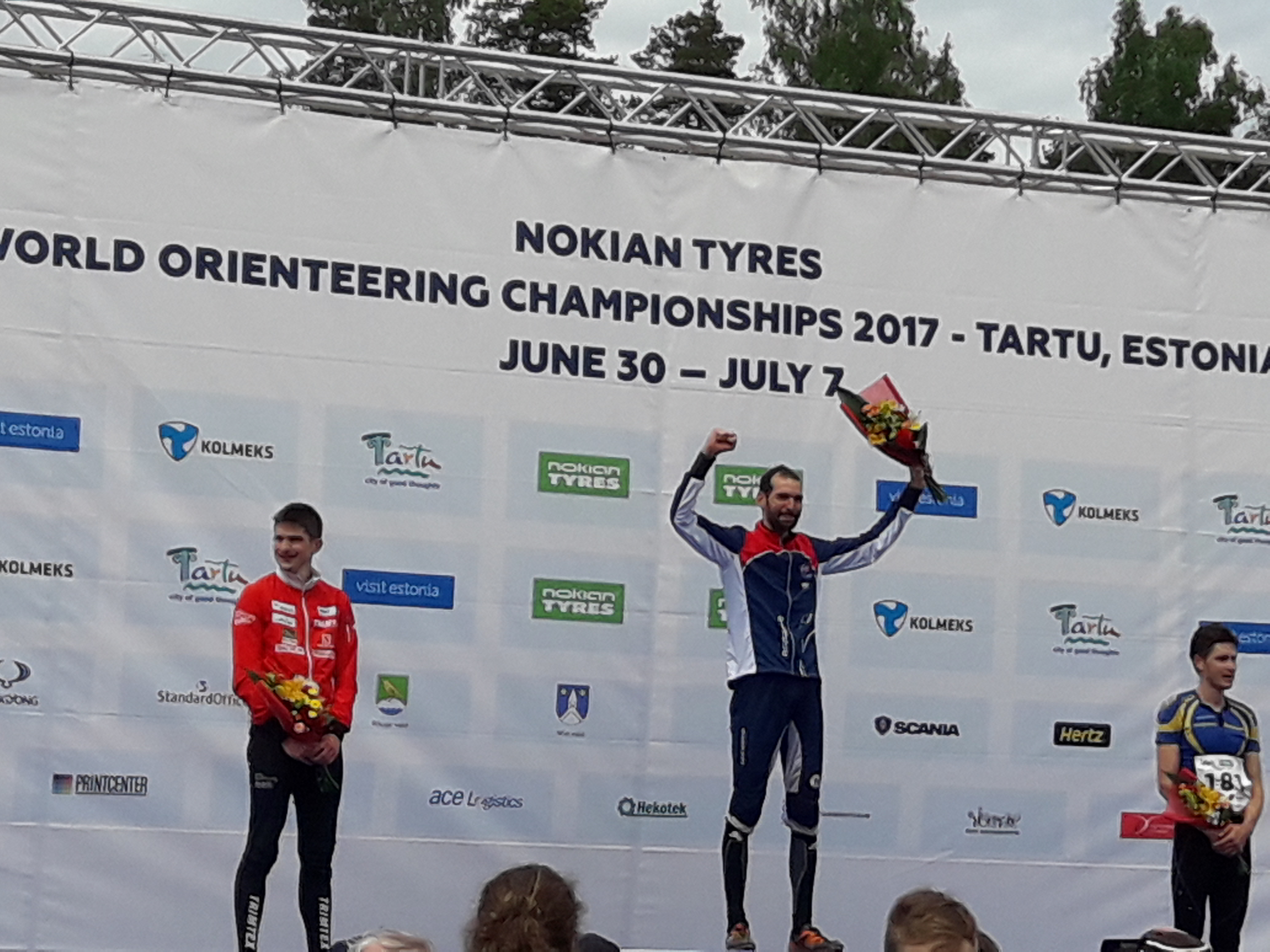 Thierry Gueorgiou on podium July 6th 2017